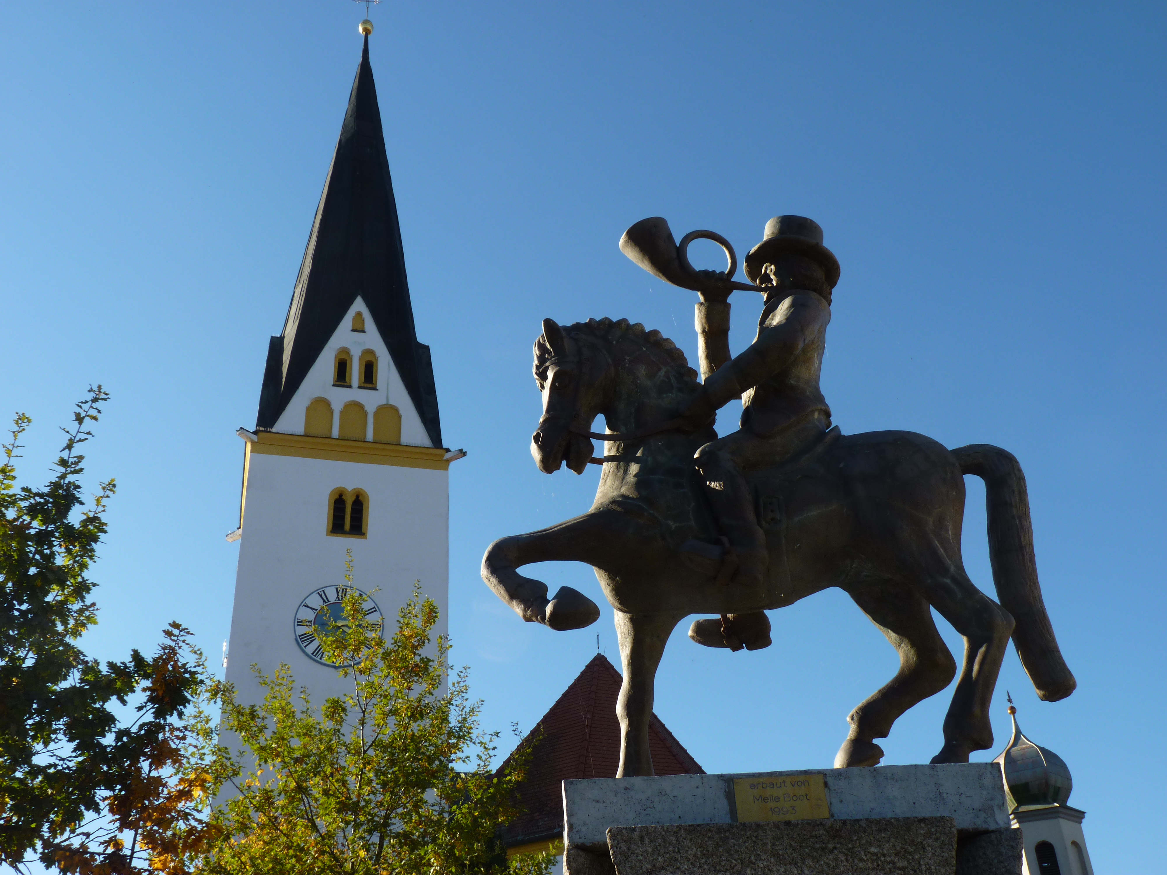 Dorfbrunnen von Straßkirchen, mit der Postillon Skulptur des ansässigen Künstlers Kasimir Boot